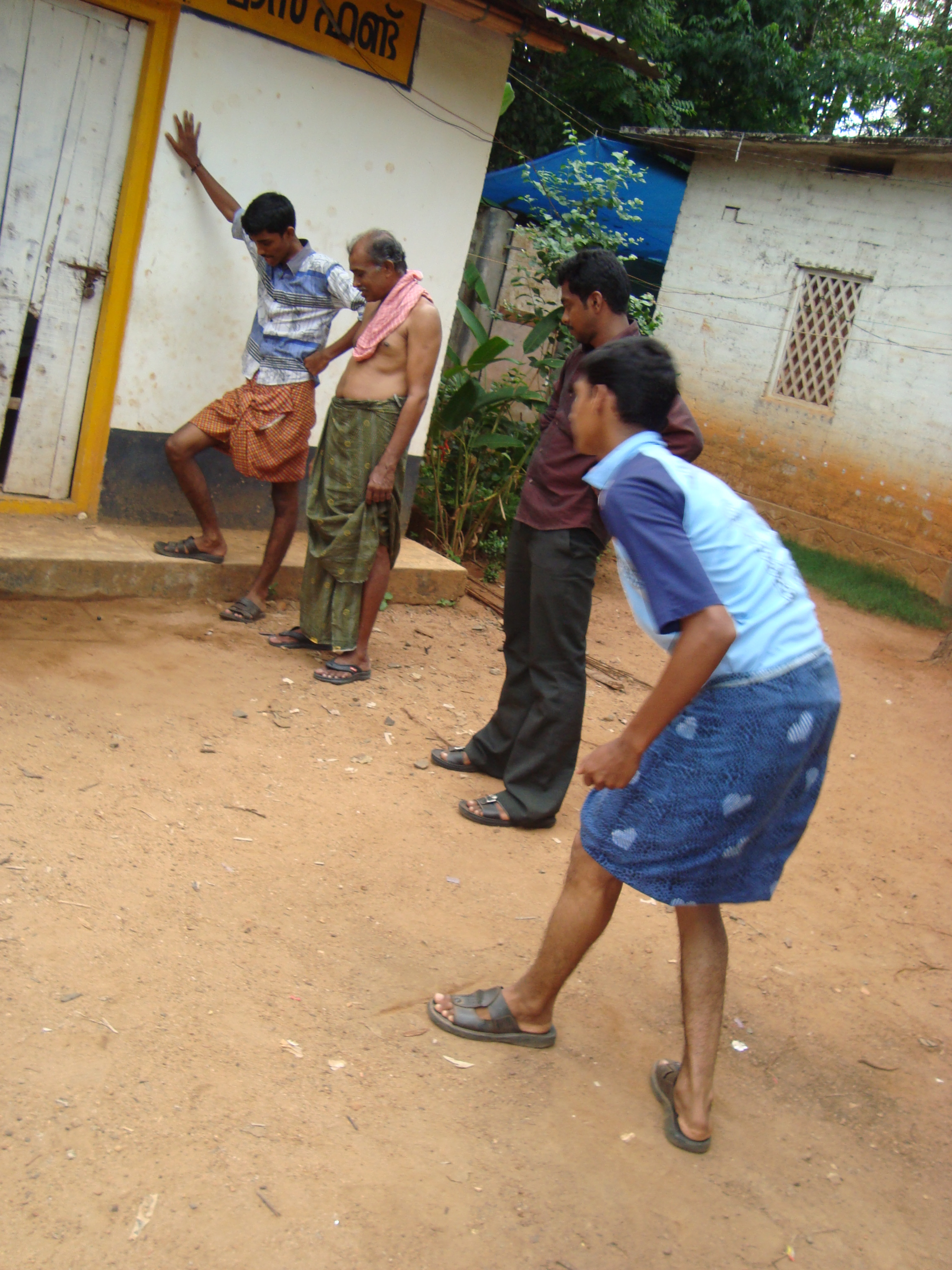 സേവികളി